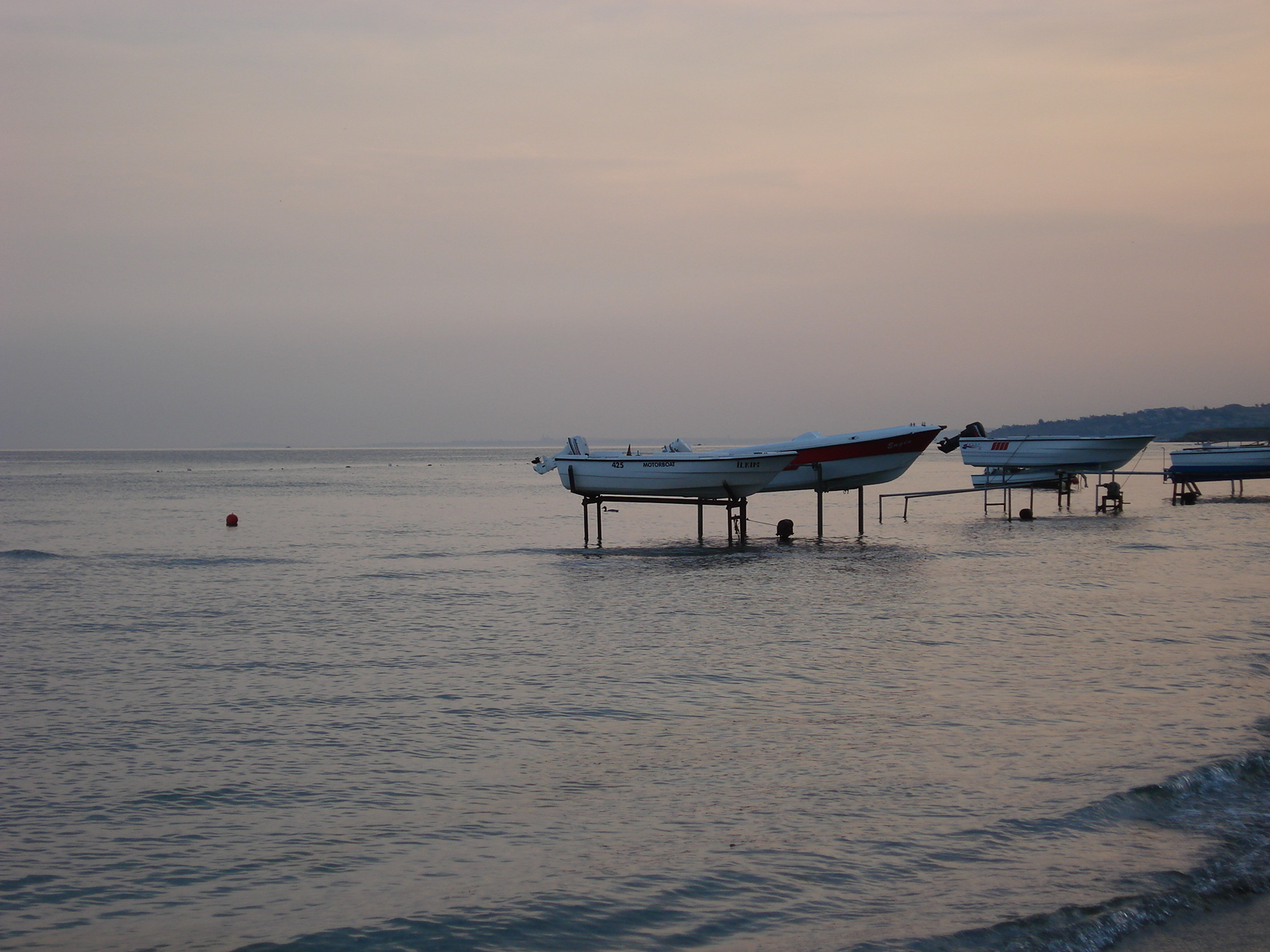 Silivri in İstanbul